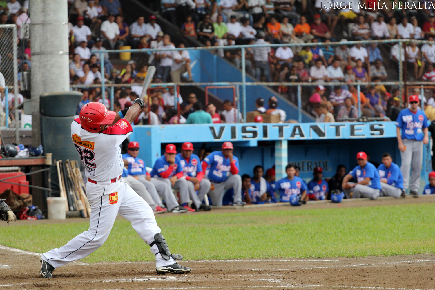 IMG_6102lnbp